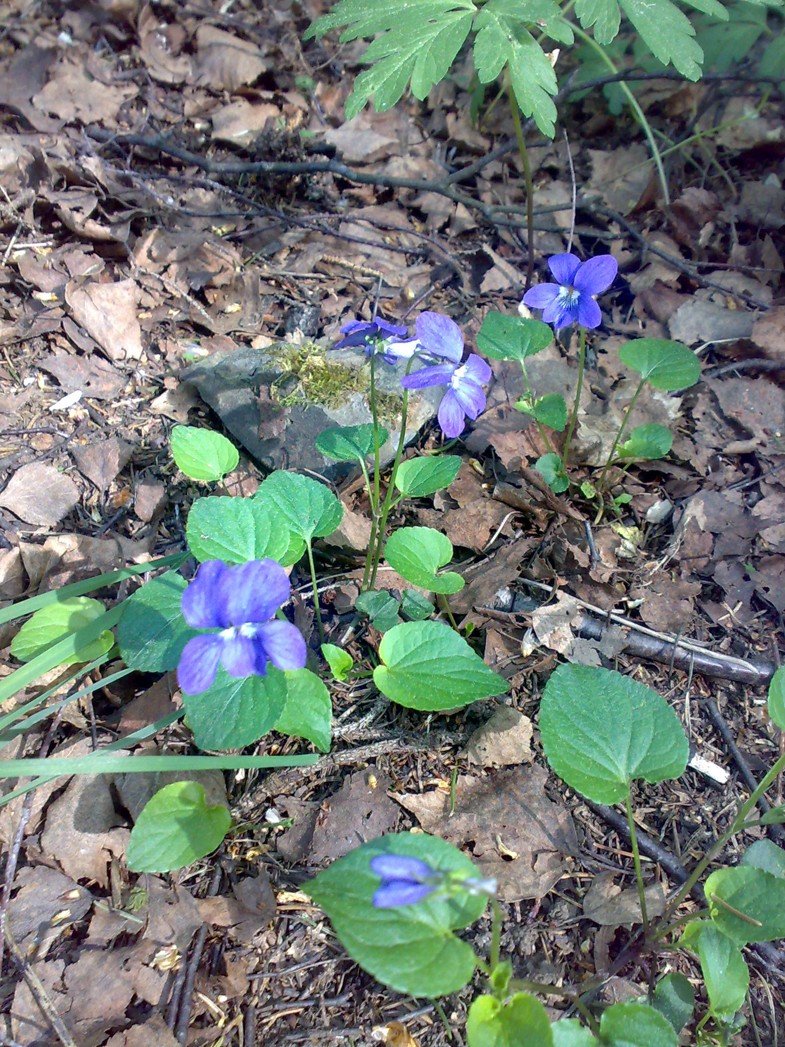 Skogsfiol Viola riviniana Bærum Norway